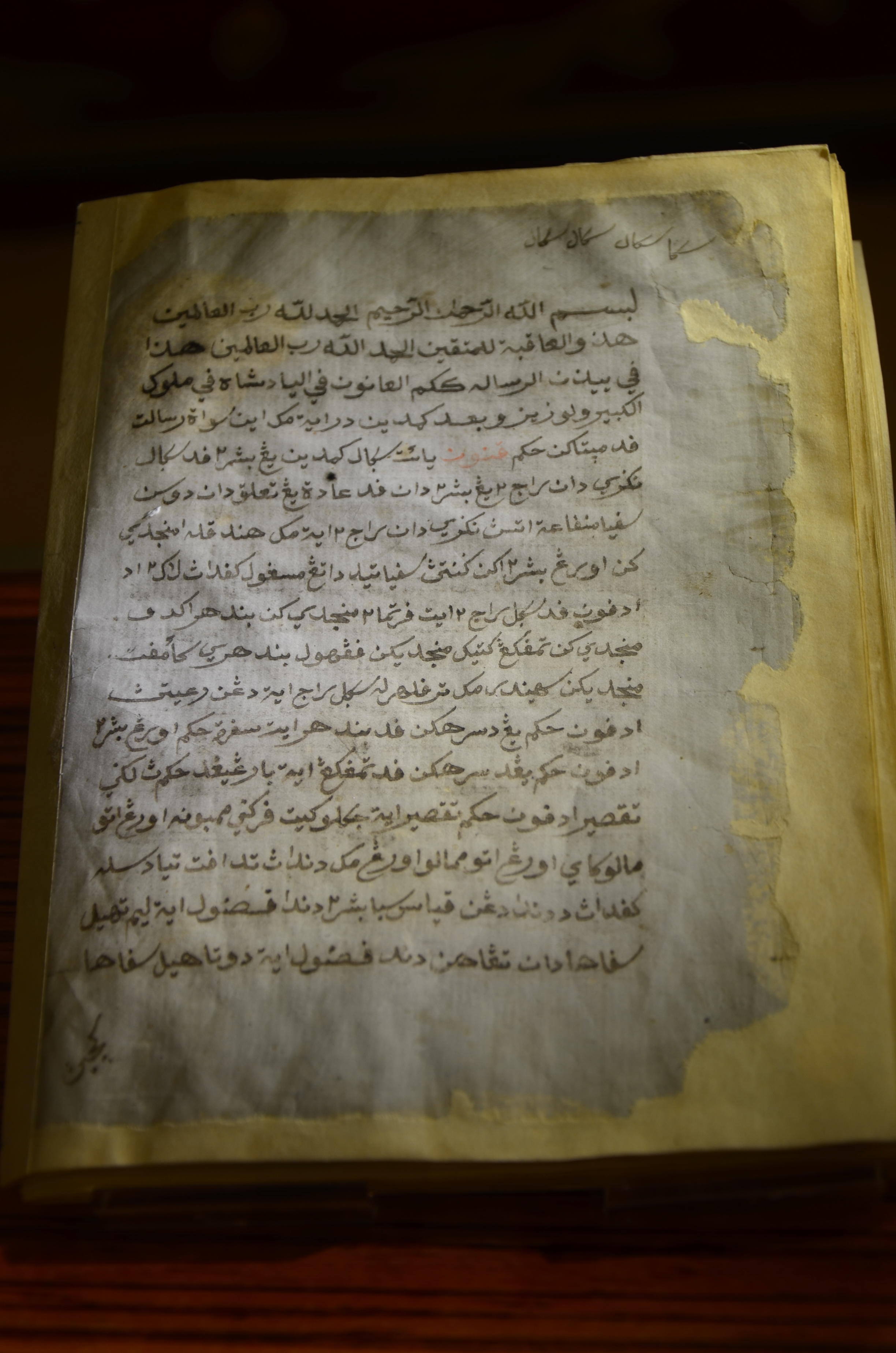 Hukum Kanun Melaka (manuskrip asal). Dipamerkan di Balairong Seri, Istana Negara Lama, Jalan Istana, 50566 Kuala Lumpur.